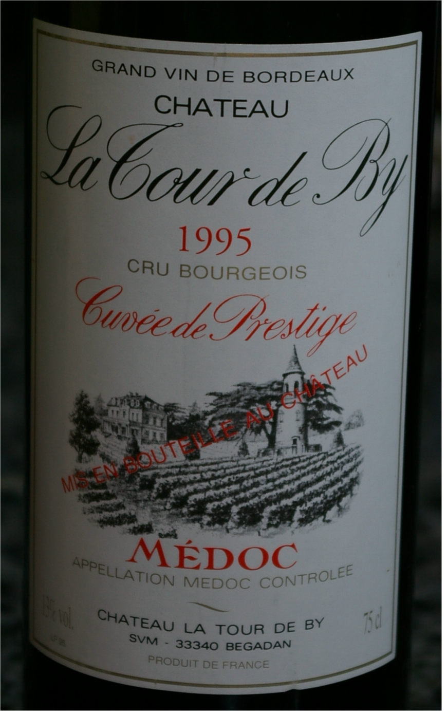 Etikett eines Bordeaux-Weines vom Château La Tour de By aus Begadan / Haut-Médoc - 1995 Cuvée de Prestige (Spitzenwein, der nur in besten Jahren in kleiner Menge gefertigt wird).